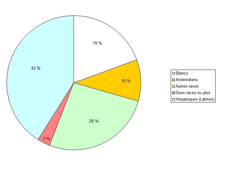 Répartition, selon la race, de la population vivant au dessous du seuil de pauvreté, à Hartford (Michigan, Etats-Unis).